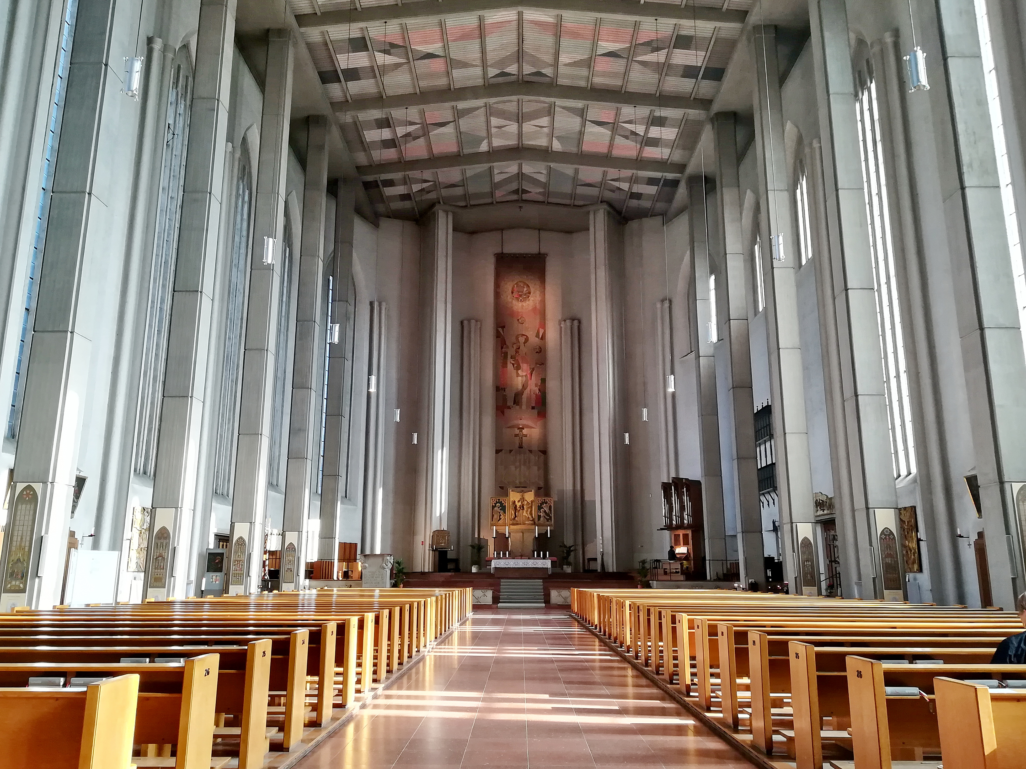 Die katholische Pfarrkirche Maria Hilf in der Au, genannt Mariahilfkirche, ist die Hauptpfarrkirche der Au.